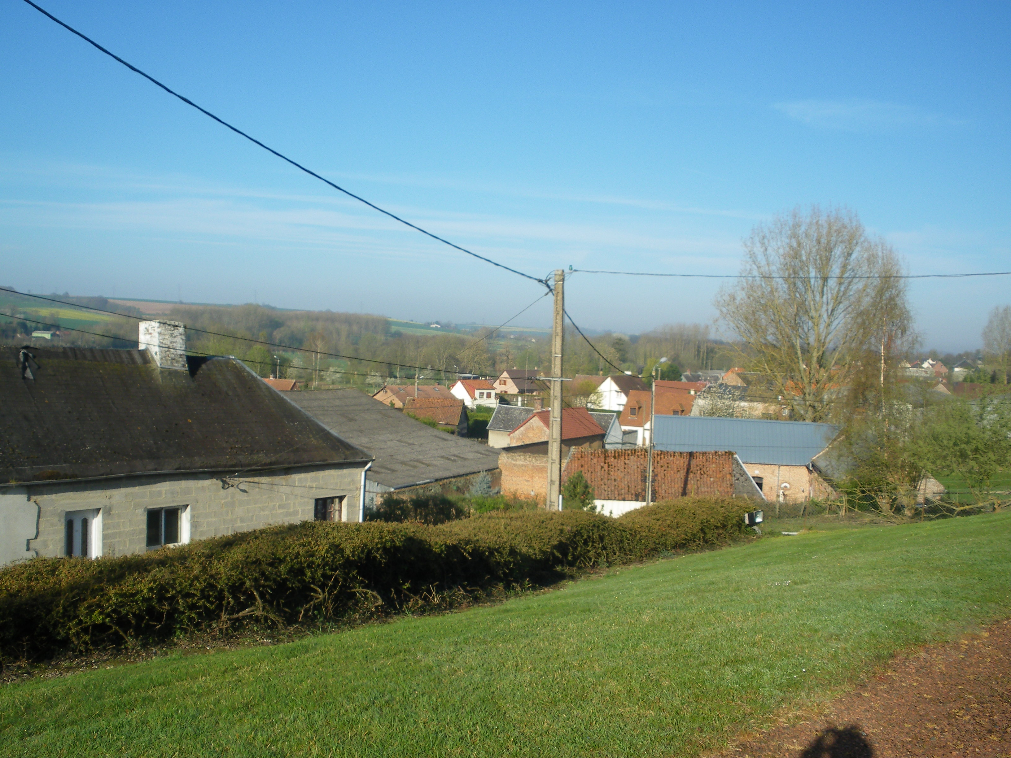 Vue de la commune d'Amplier depuis l'église Saint-Hilaire.